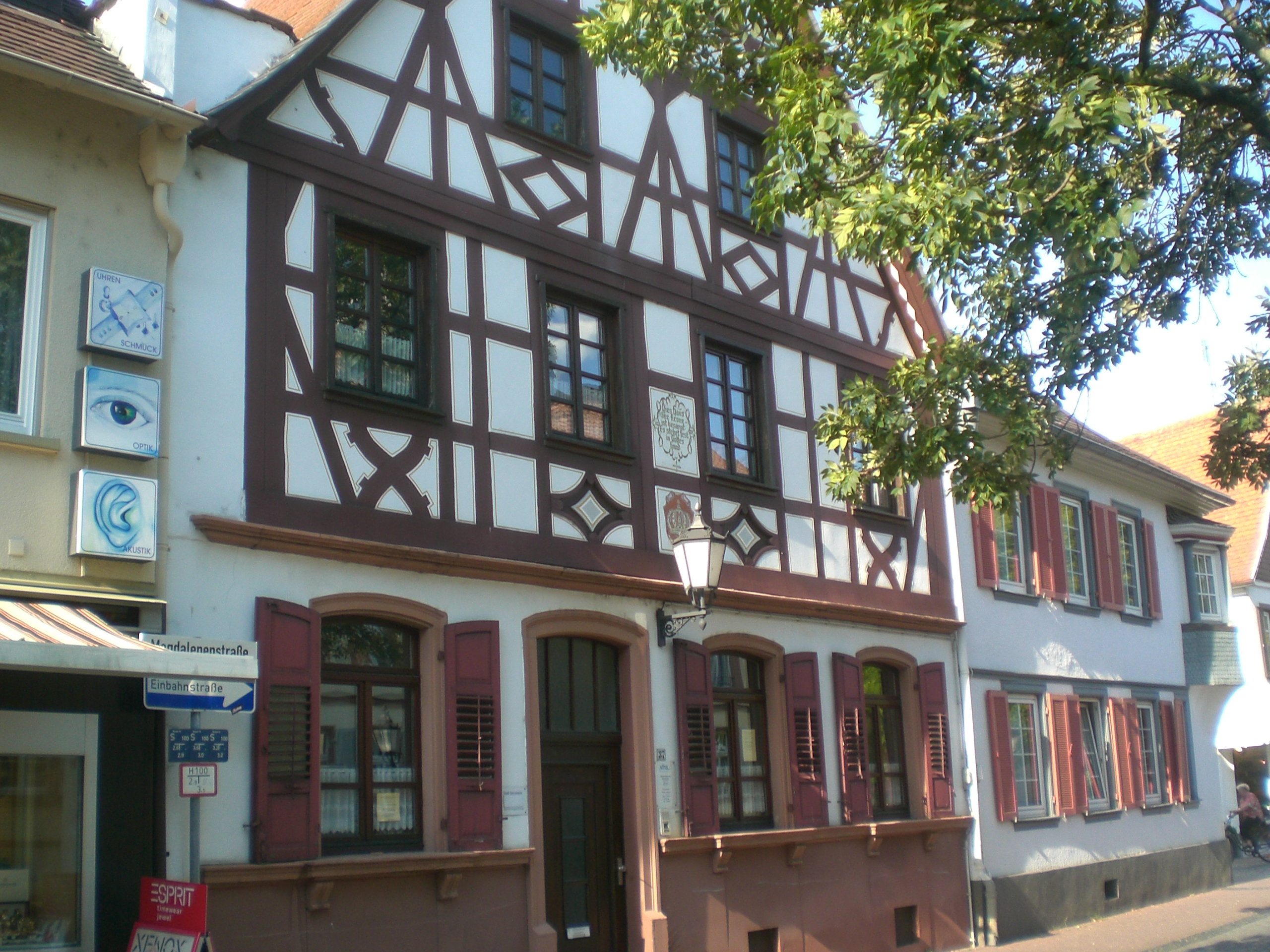 historia domo Magdalenenstr. 37 en Gernsheim, Hesio